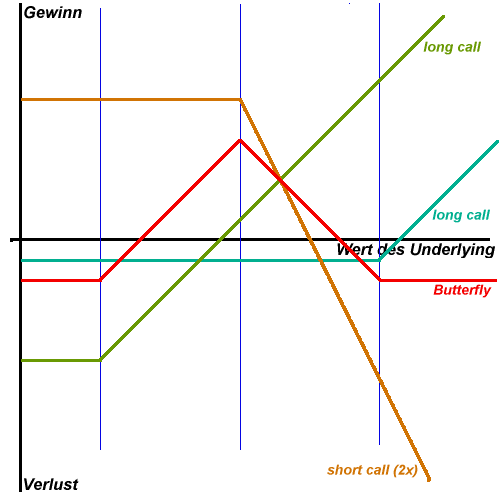 Auszahlungsdiagramm eines Butterfly